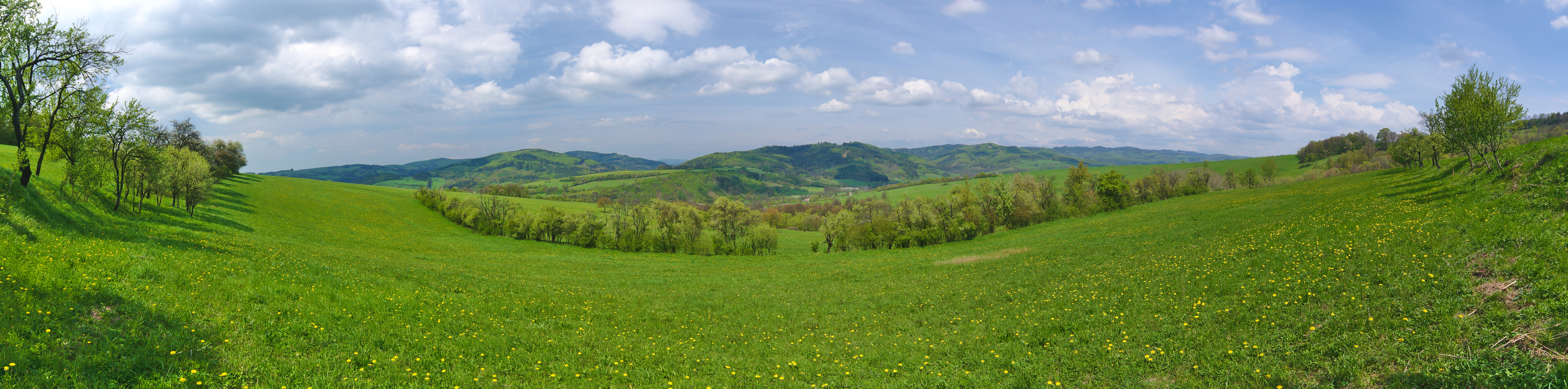 Panoramatický pohled na sever východně od Brumova, okres Zlín